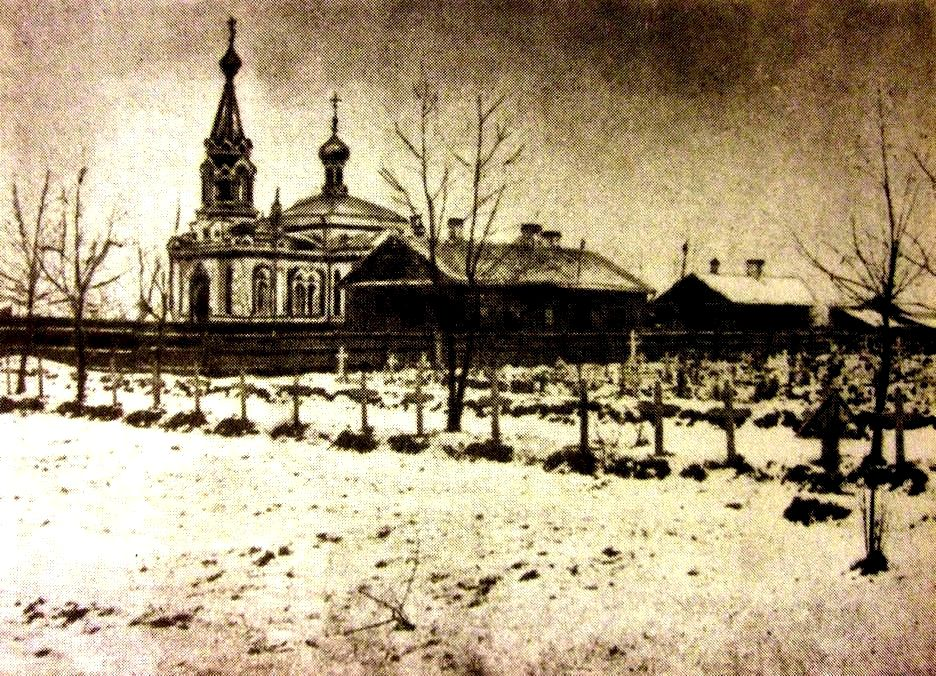 Могилы жертв Кровавого воскресенья 1905 г. Фотография